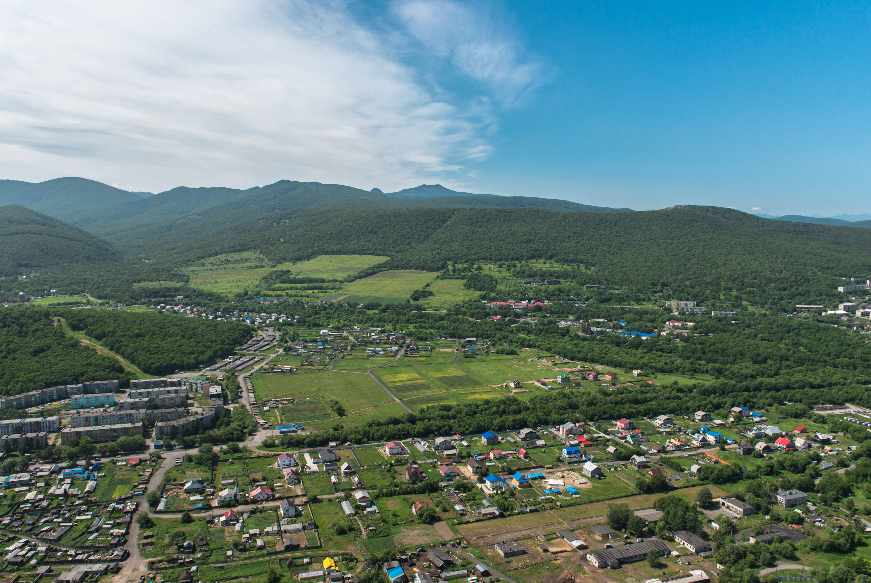 Kamchatskiy kray, Russia, 684007